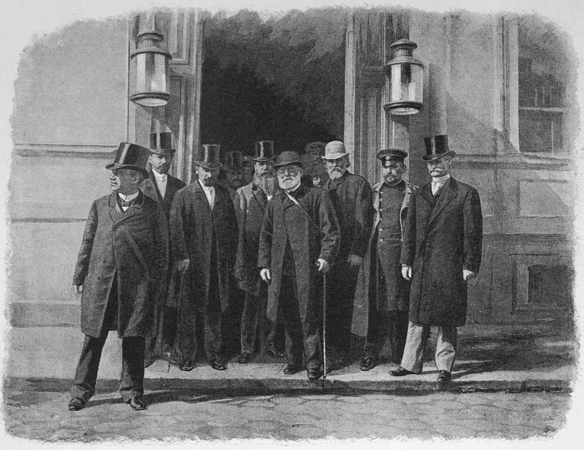 Встреча Вирхова в Санкт-Петербурге на вокзале Николаевской железной дороги, 13 (25) августа 1892 г.